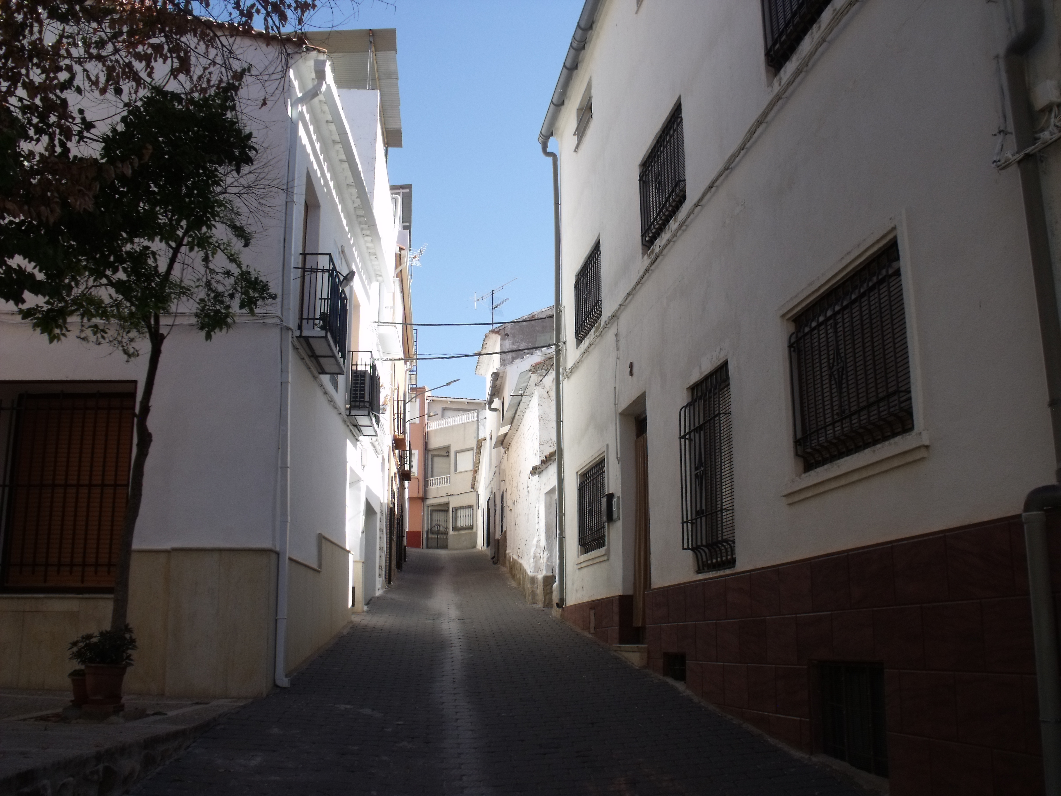 Calle de Terrinches